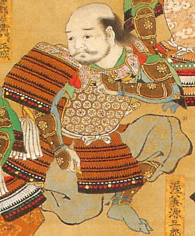 内藤正成の肖像。